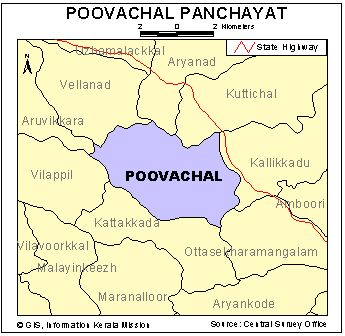 ഭൂപടം